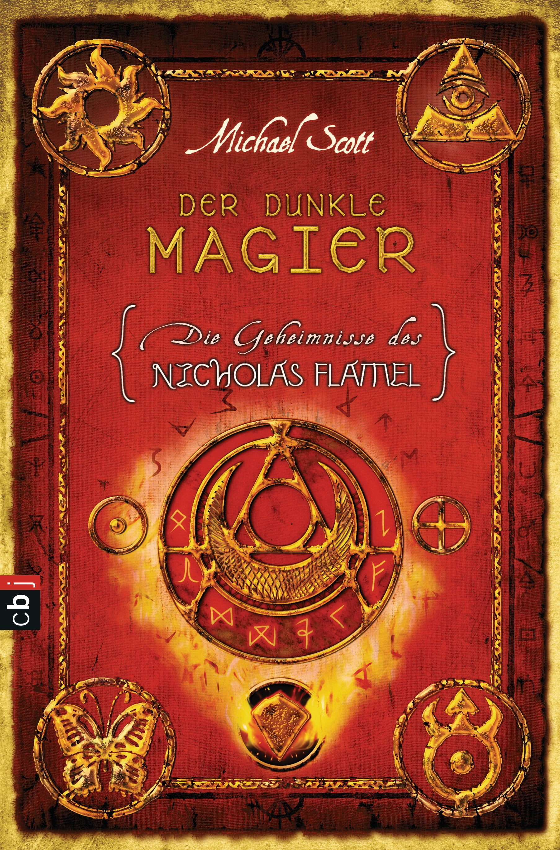 Michael Scott: Die Geheimnisse des Nicholas Flamel. Der dunkle Magier. cbj, München 2009. DNB